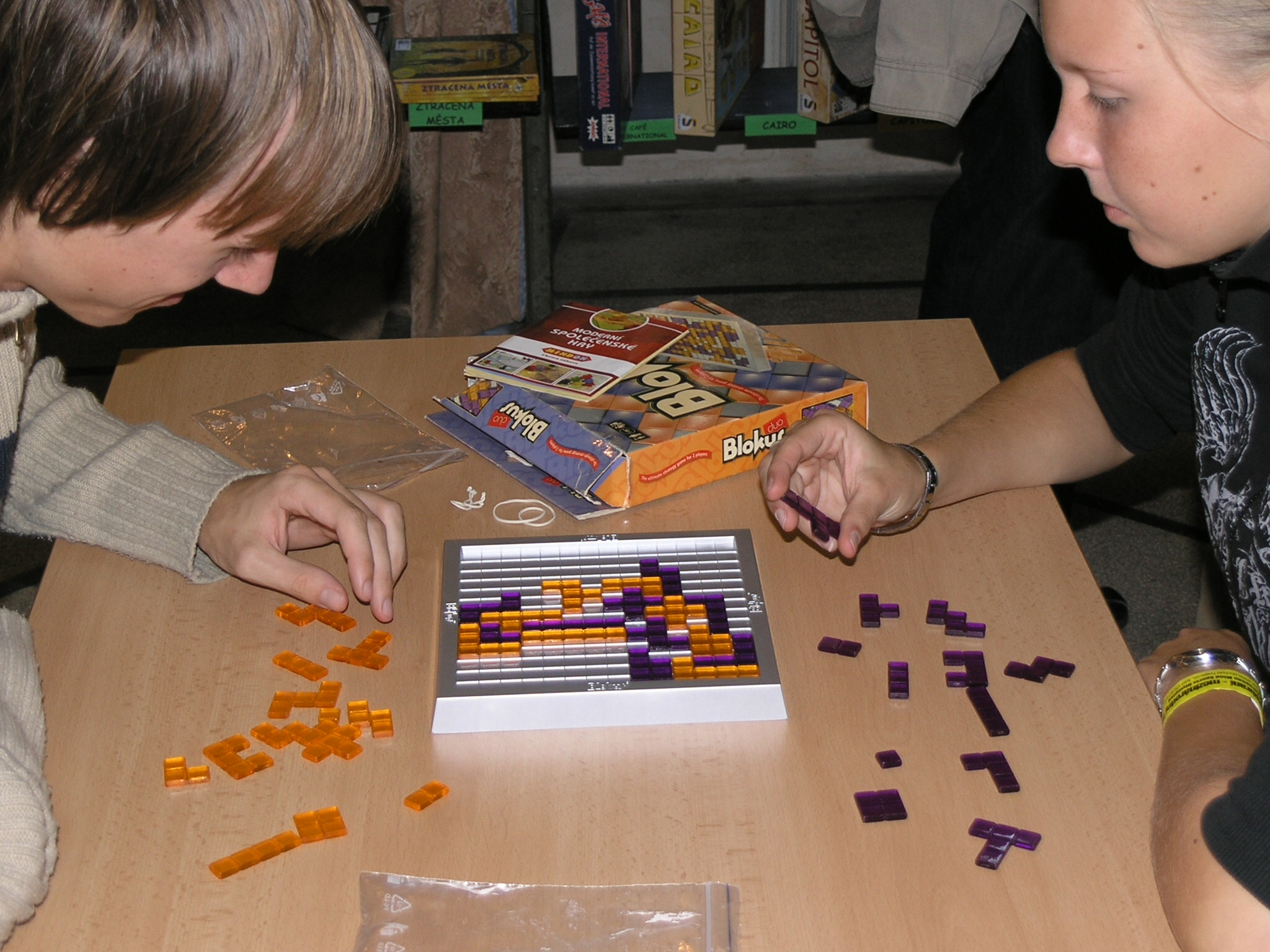 Herní festival Deskohraní 2008 - Blokus duo